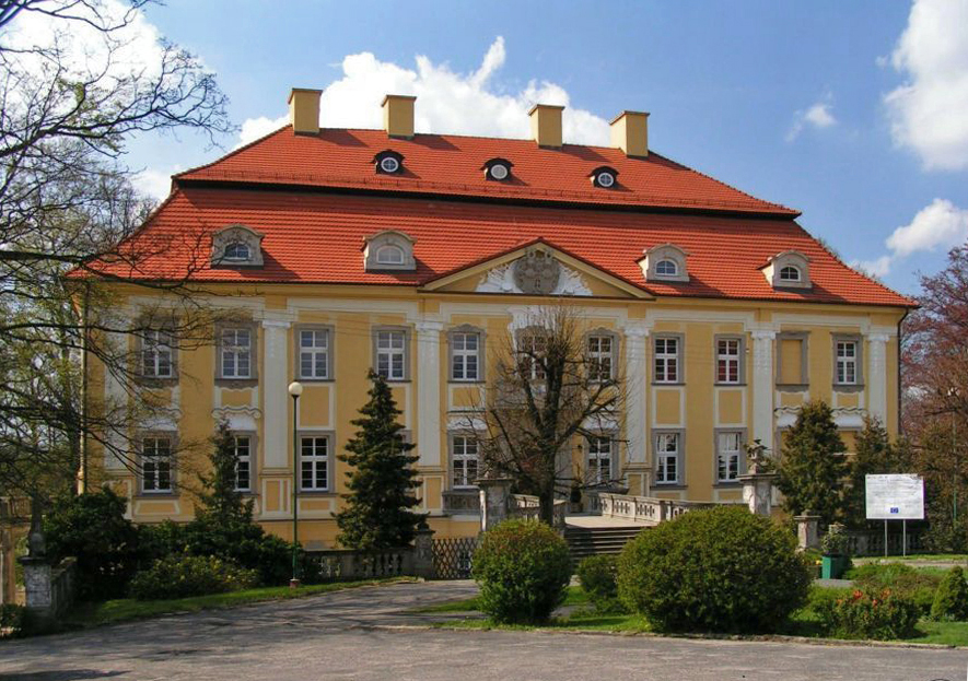 Pałac w Biedrzychowicach - wejście główne.